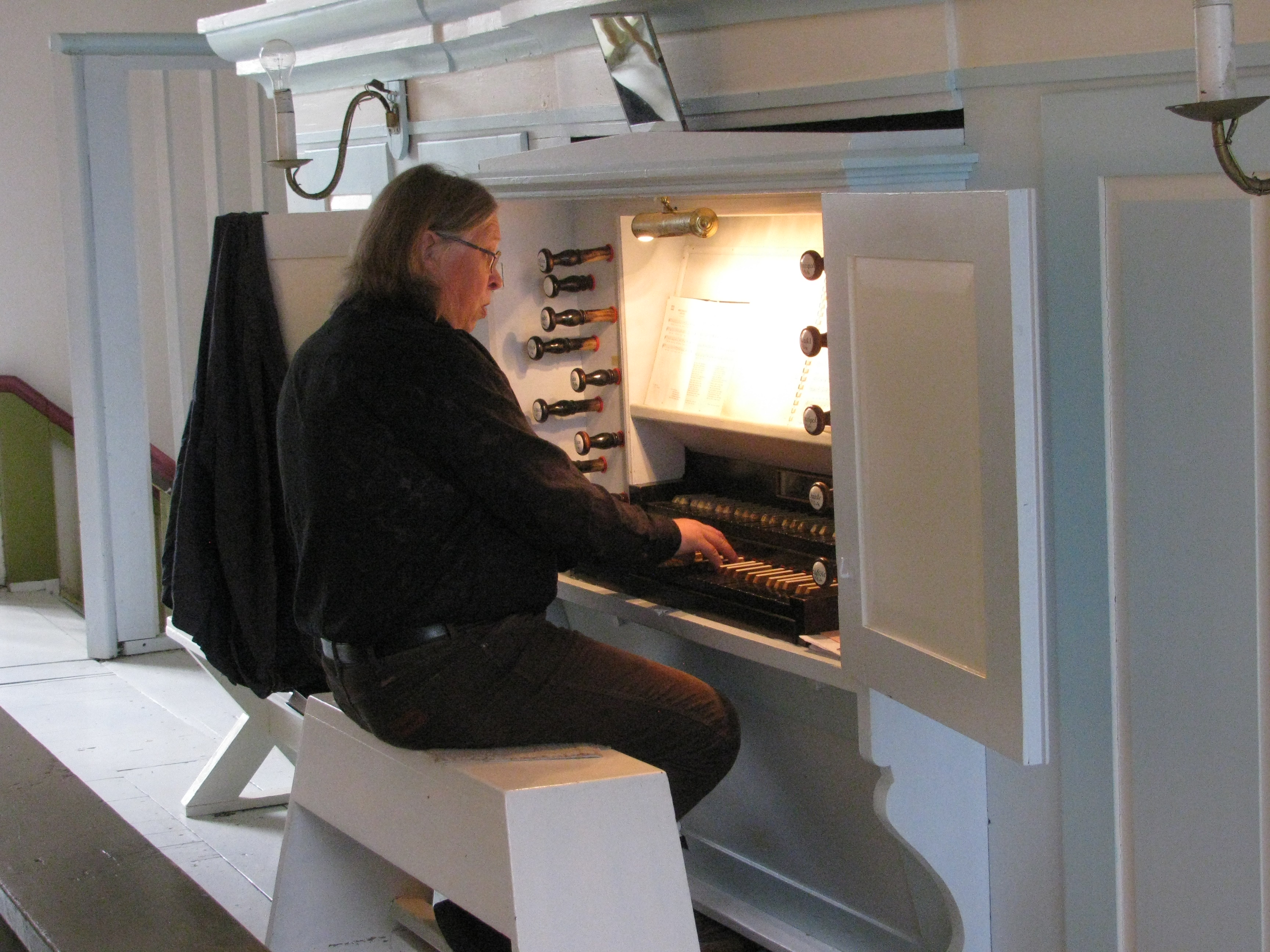 Andres Uibo Vigala Maarja kirku orelil